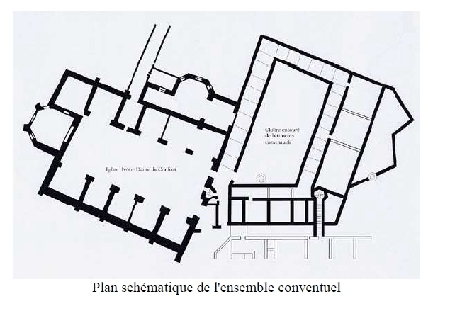 Arles (Bouches-du-Rhône_France), église et couvent des Dominicains ou Frères Prêcheurs, quai Marx Dormoy, plan d'ensemble.